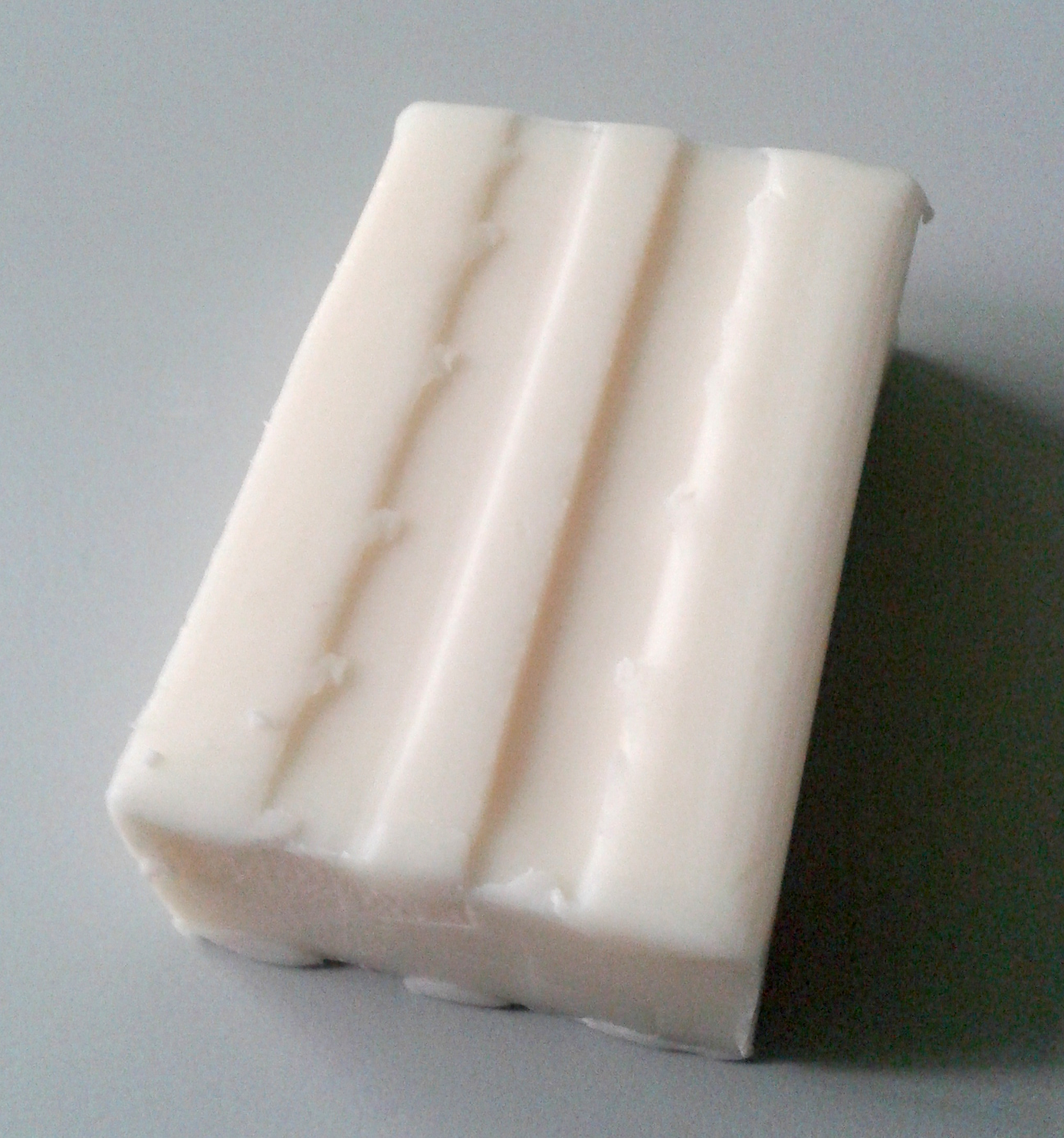 Dalli-Kernseife, gekauft in einer Rossmann-Filiale